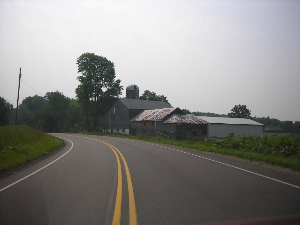 US Route 6 - Pennsylvania